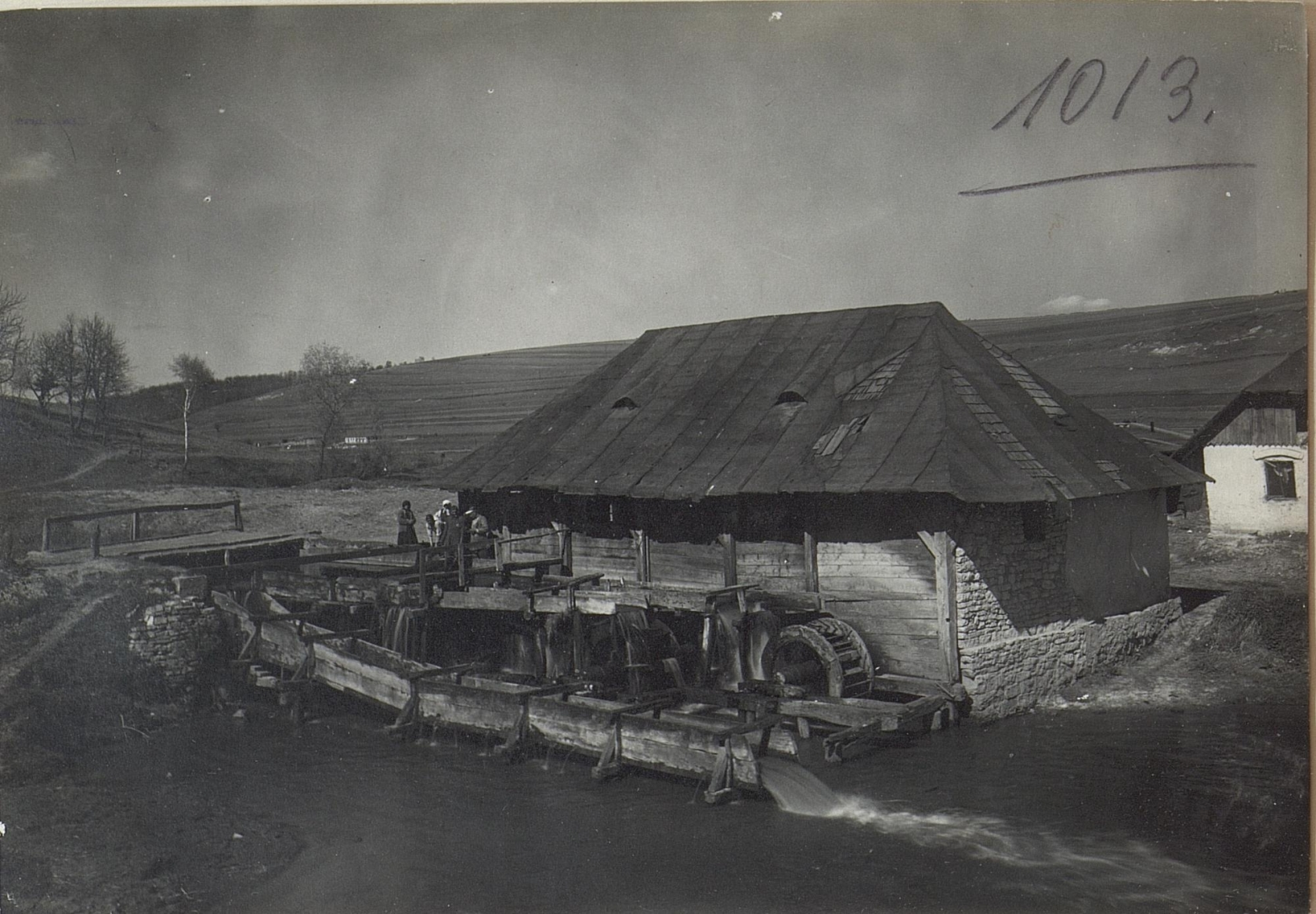 Mühle in Lipica Dolna a.d.Narajowka